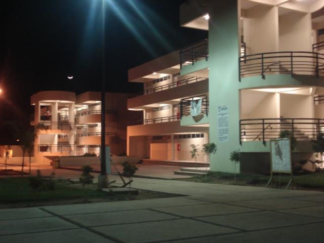 Universidad Autónoma de Baja California Campus Valle Dorado